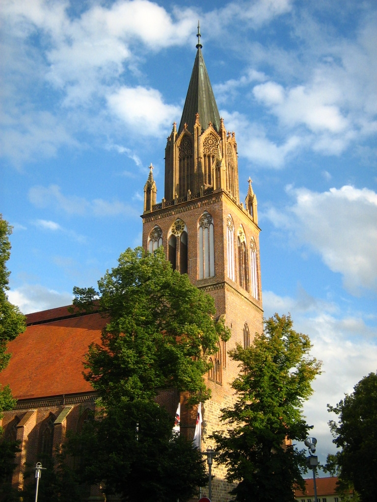 Turm der Marienkirche in Neubrandenburg.